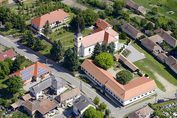 Légi fotó